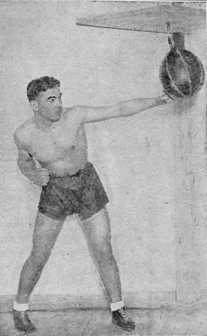 Henryk Chmielewski (-1936)